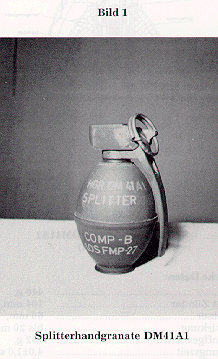 Splitterhandgranate DM41A1 der Bundeswehr